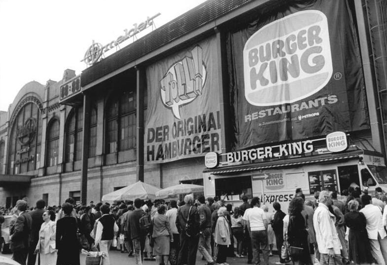 Dresden, Fastfood-Restaurant "Burger King" ADN-Matthias Hiekel 4.7.90-Dresden: Burger King. Als erstes amerikanisches Restaurant in der DDR eröffnete am Dresdner Hauptbahnhof die Firma "Burger King" in Zusammenarbeit mit der Mitropa eine Verkaufseinrichtung. 400 Original-Hamburger, Whopper und andere Spezialitäten können pro Stunde hergestellt und verkauft werden.